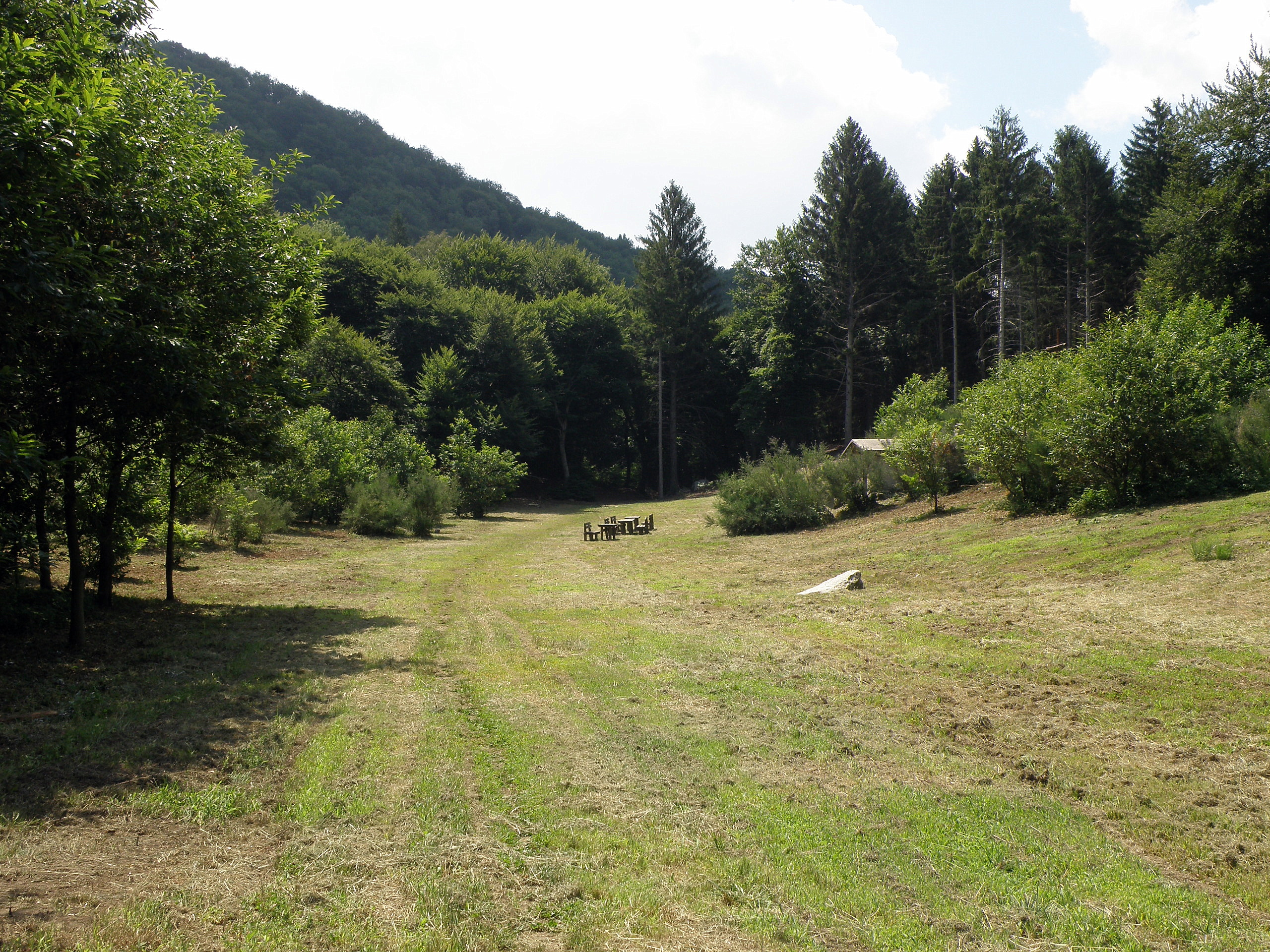 Campo dei Fiori (VA), rifugio del Pian delle Noci.